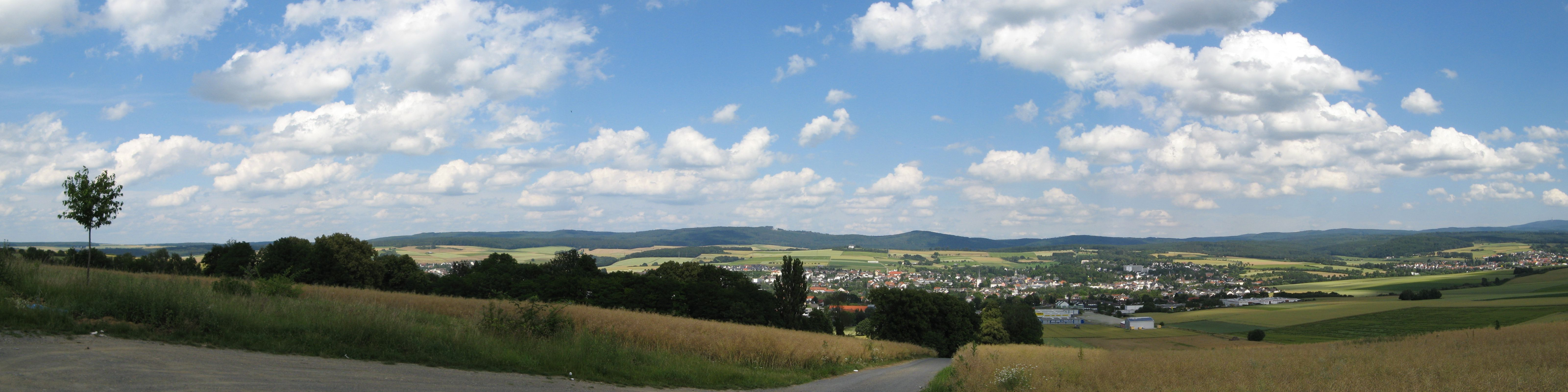 Stadtpanorama von Bad Camberg aus der Nähe der Autobahnabfahrt. Im Hintergrund die Berge des Taunus